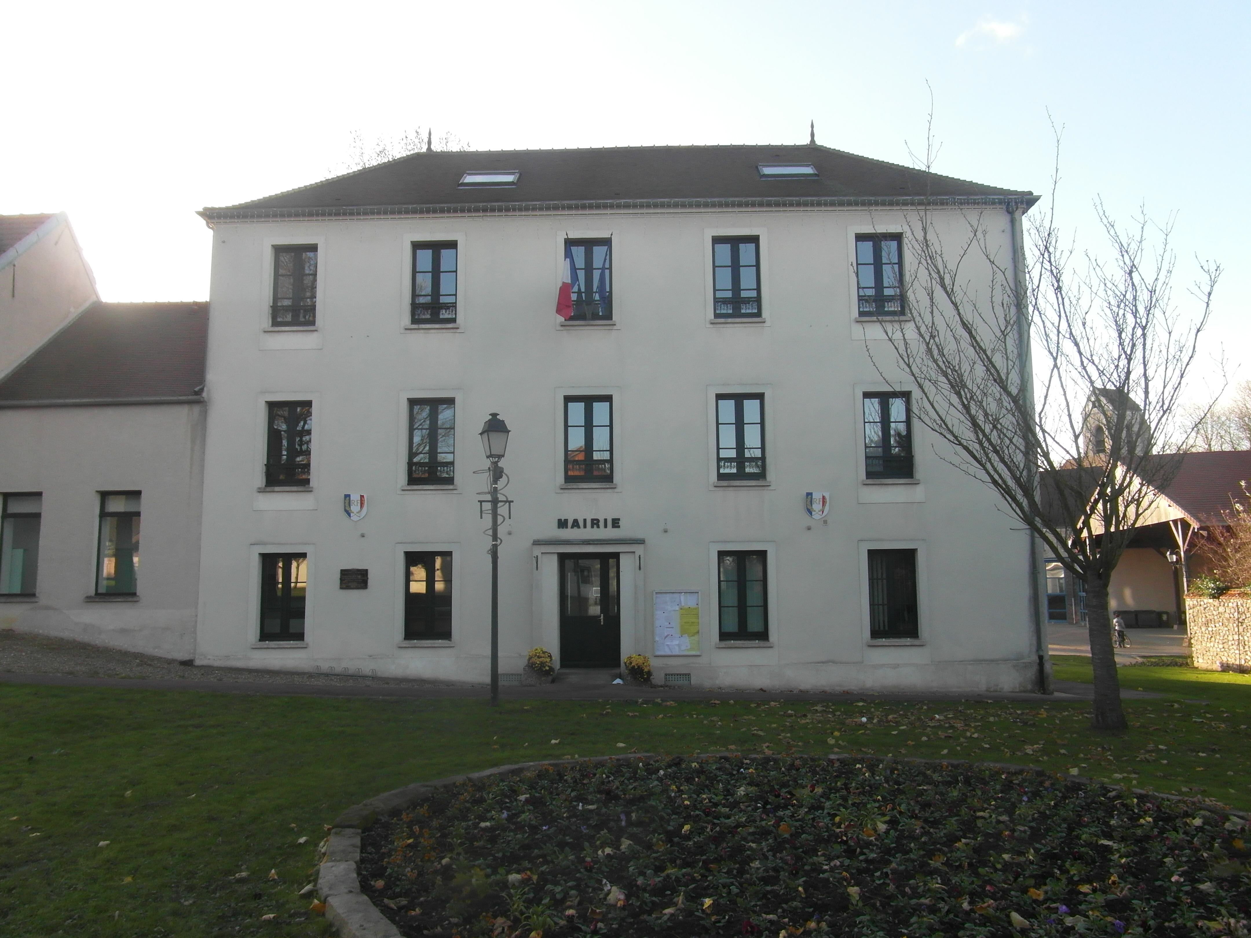 Mairie de Servon (Seine-et-Marne)